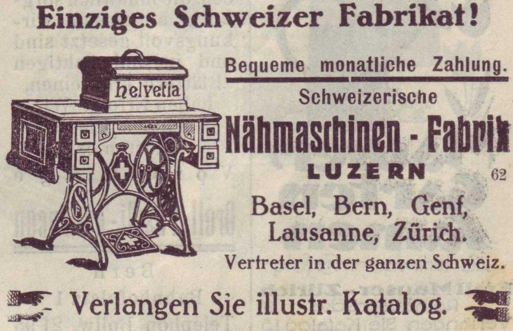 Reklame Nähmaschine Helvetia 1924, Luzern, Schweiz